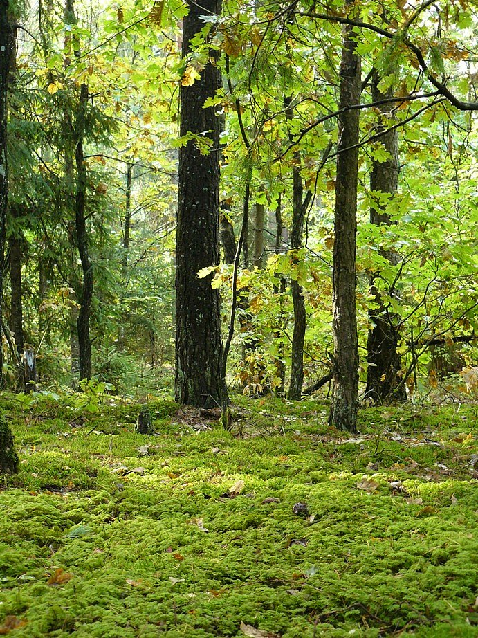 Фото путешествия по Беларуси.